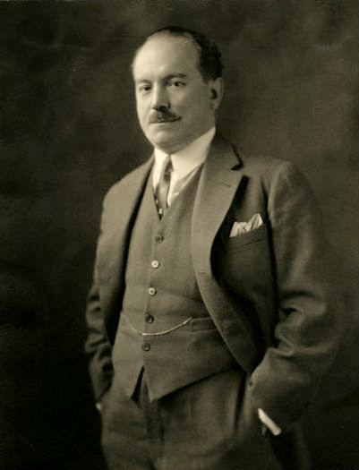 Carlos Dávila Espinoza. Embajador de Chile en EE.UU "Carlos Dávila Washington D.C. 1927".